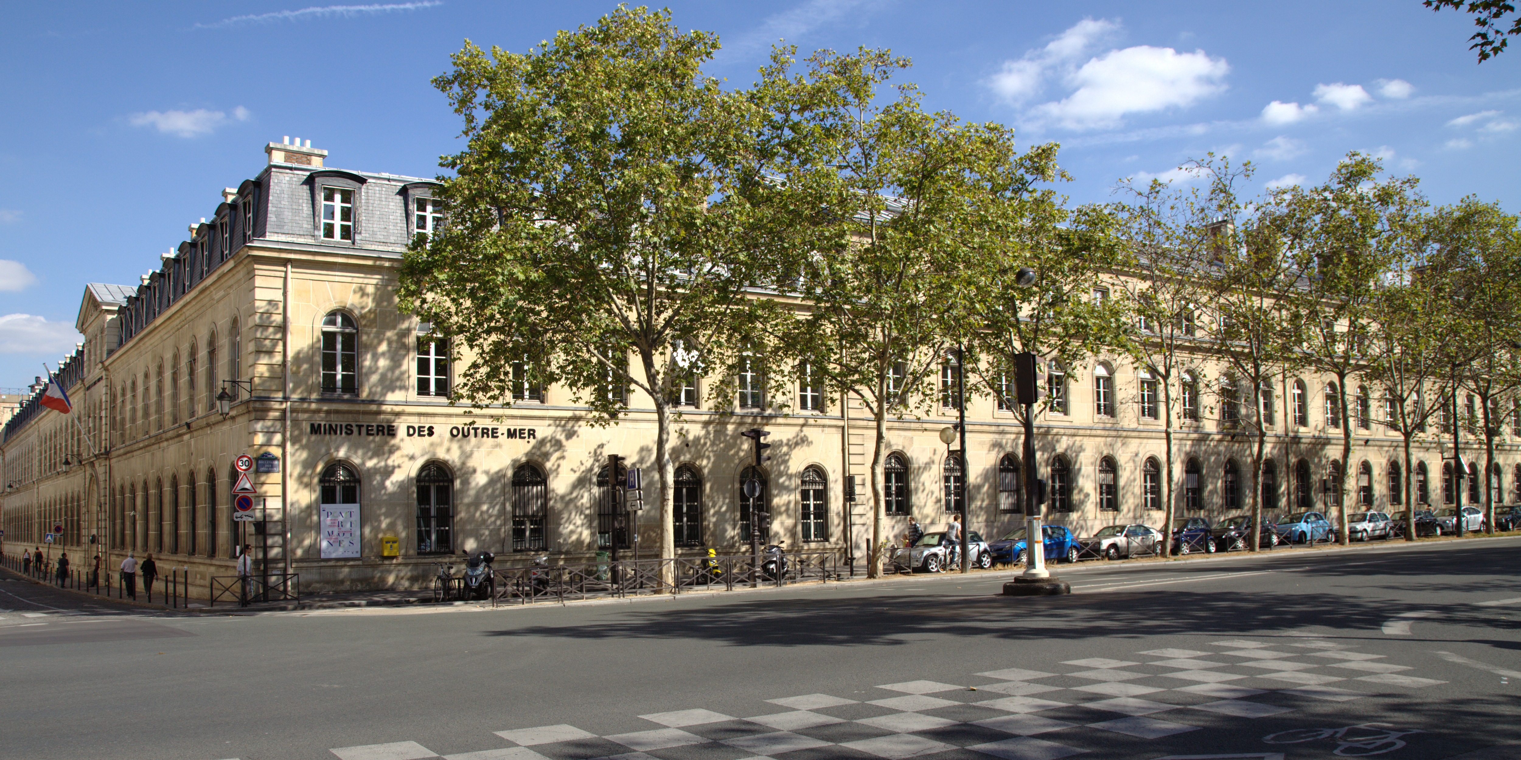 L'hôtel de Montmorin, Paris VII (aujourd'hui Ministère des Outre-Mer), vue depuis le boulevard des Invalides